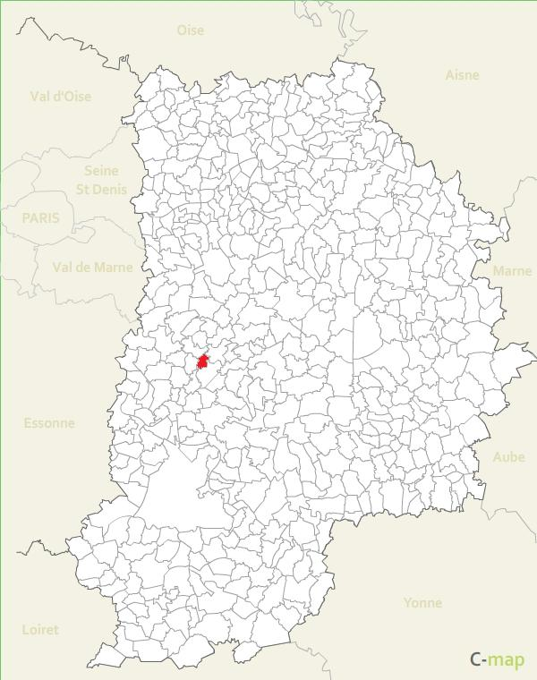 Français